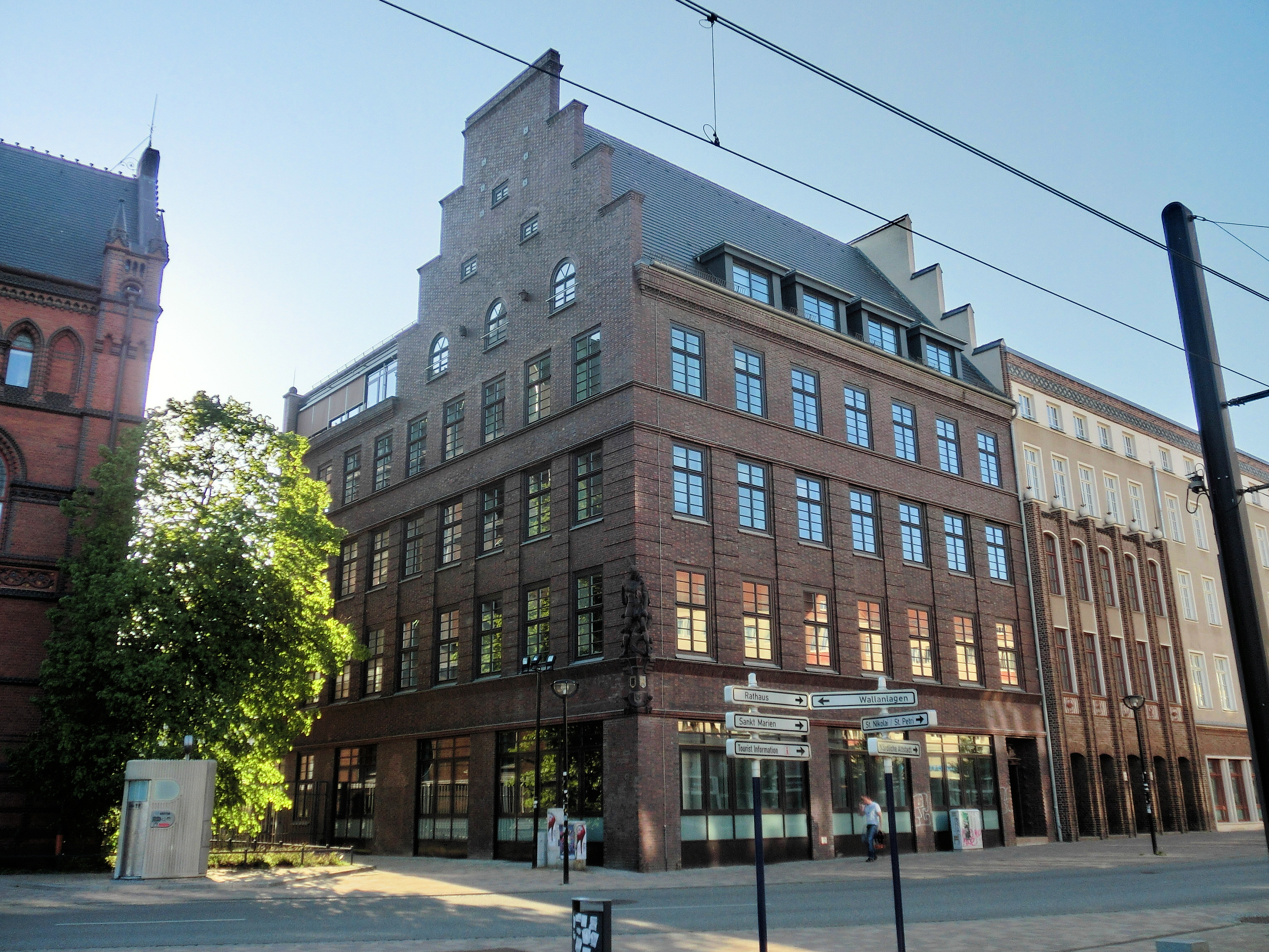 Verwaltungsbau, 1928 eingeweiht durch und für die Mecklenburgische Brandkasse, Architekt: Ernst Stoffers (1876-1963) (Baudenkmal, Rostock, Steinstraße 2)